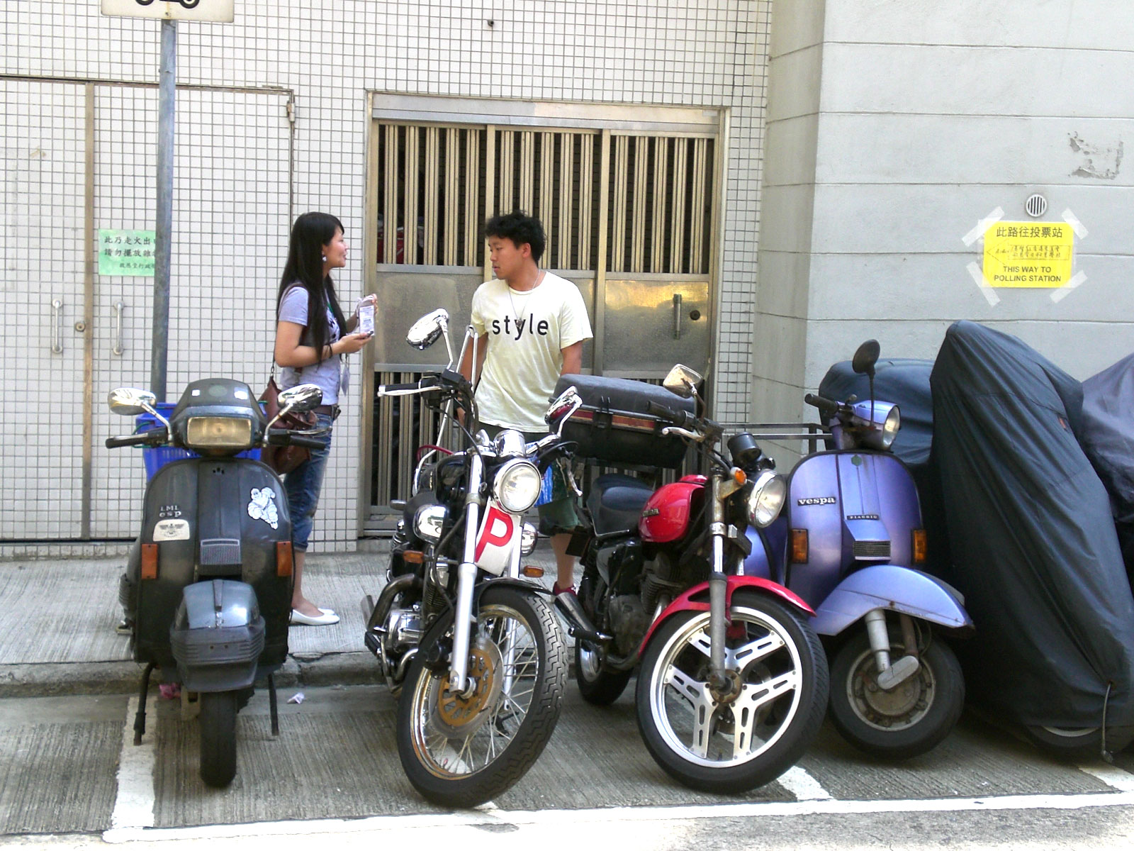 2008年香港立法會選舉, 在zh:西營盤zh:第三街救恩堂投票站和附近的票站調查